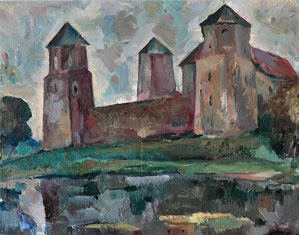 Феліцыян Каварскі (1890–1948). Мірскі замак. Палатно, алей.